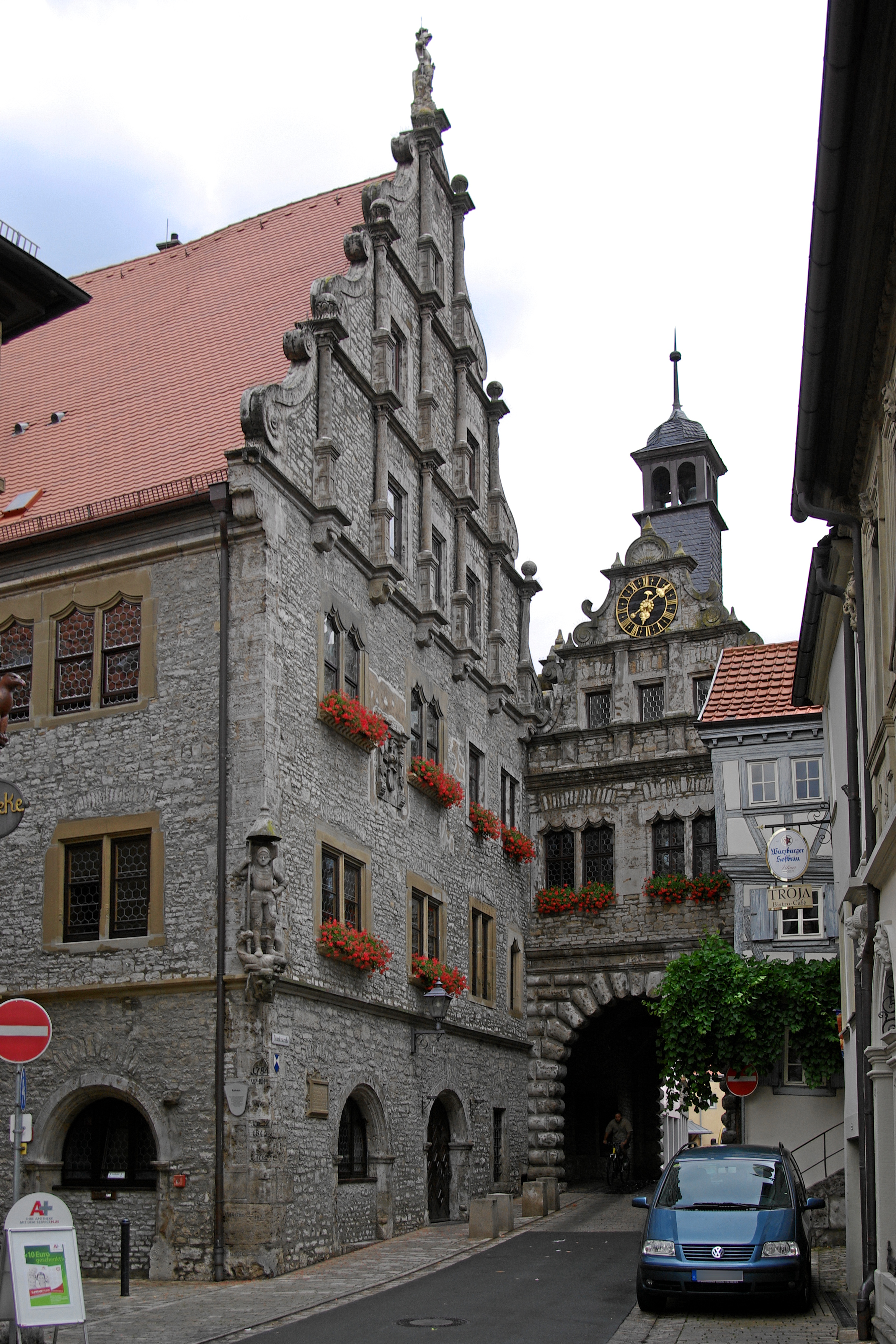 Marktbreit, Maintor, Stadtseite